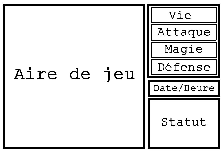 Design du jeu Super Hydlide